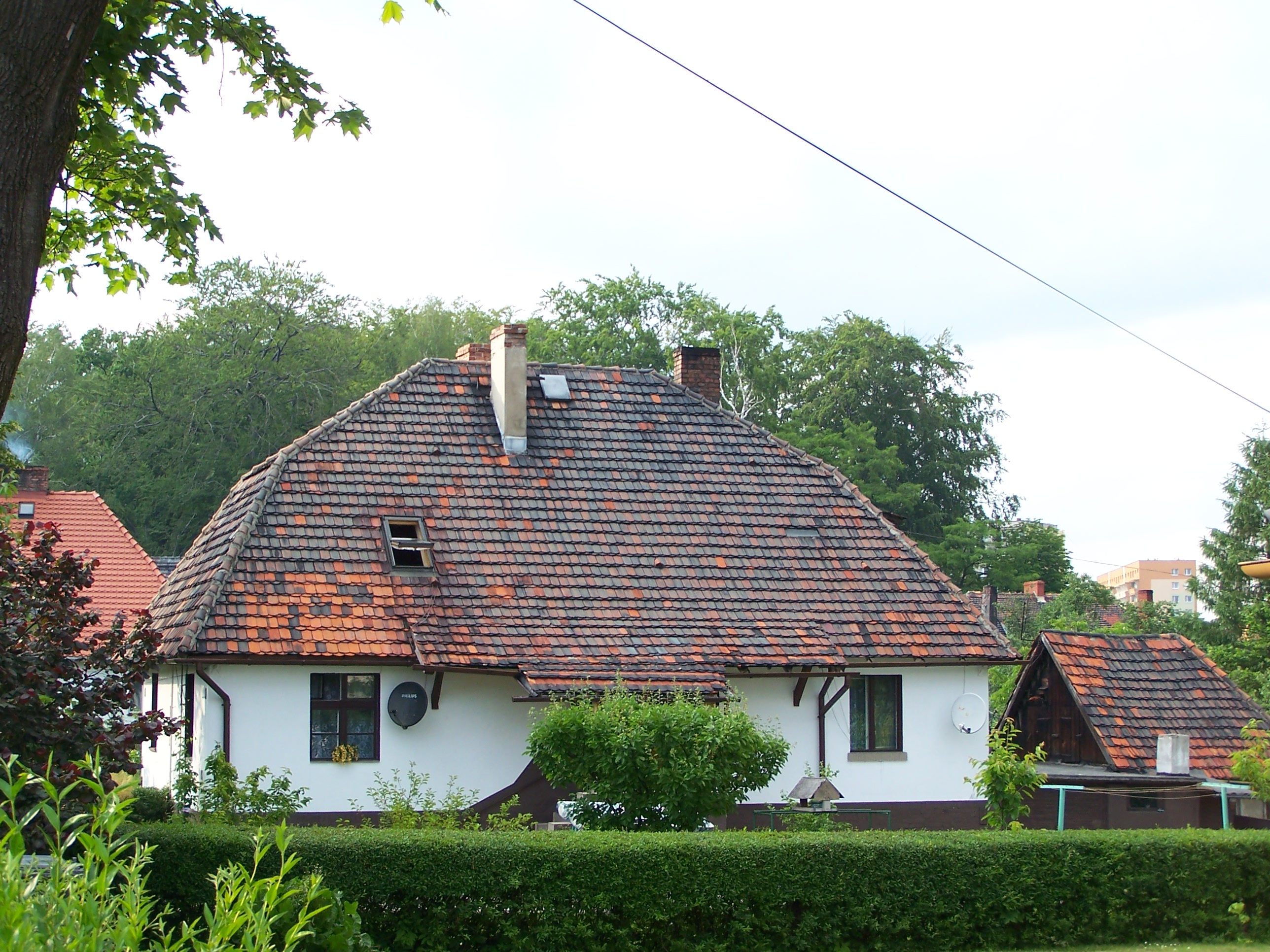 Jeden z zabytkowych domków na osiedlu Giszowiec w Katowicach.